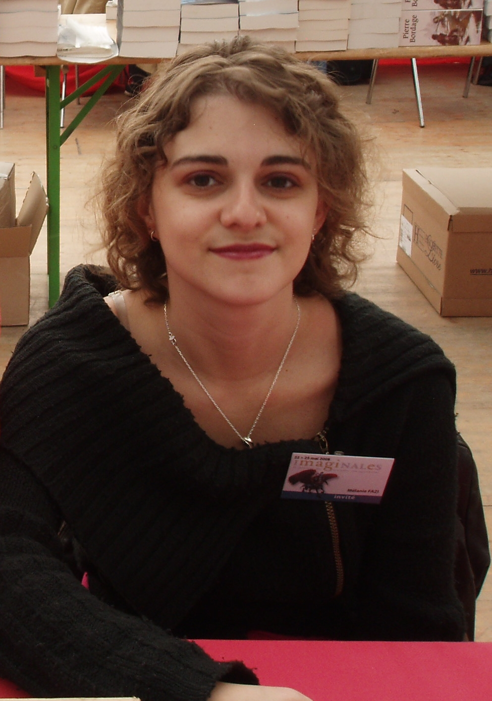 L'auteure française de fantastique et de fantasy Mélanie Fazi lors du 7ème festival des mondes imaginaires Les Imaginales à Epinal (département des Vosges en France) en mai 2008.